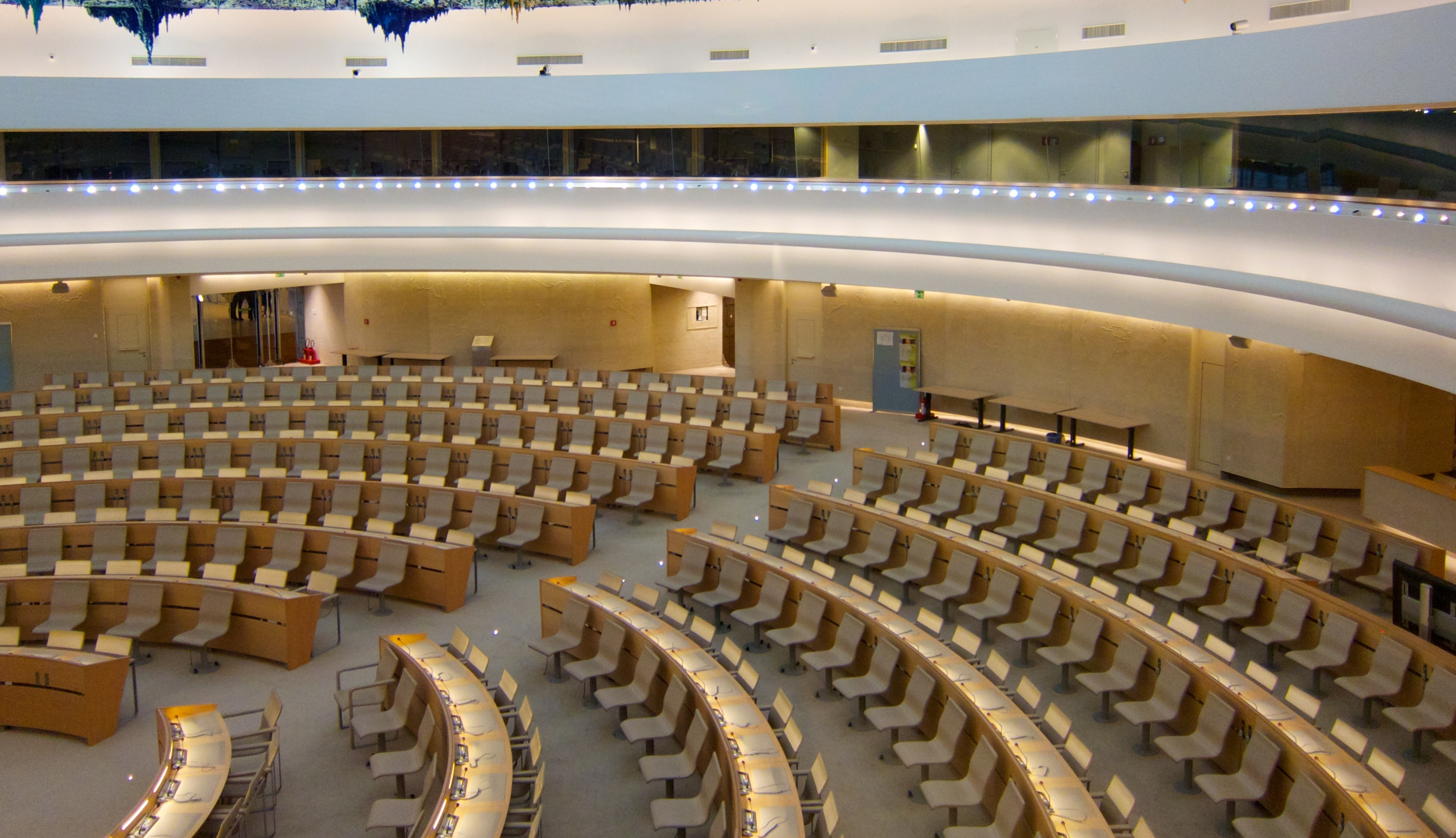 Ceiling by Miquel Barceló.